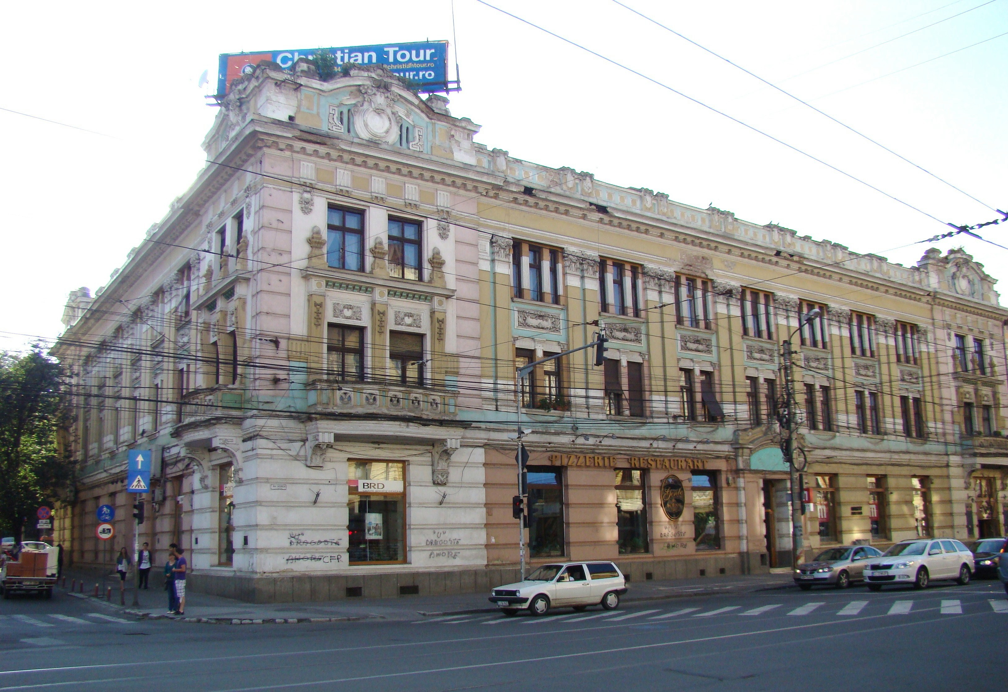 Clădire monument istoric, str.Horea, nr.5